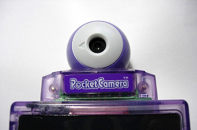 任天堂のゲームボーイ用周辺機器、「PocketCamera」(ポケットカメラ)、MGB-006。提供者nmaedaが撮影。